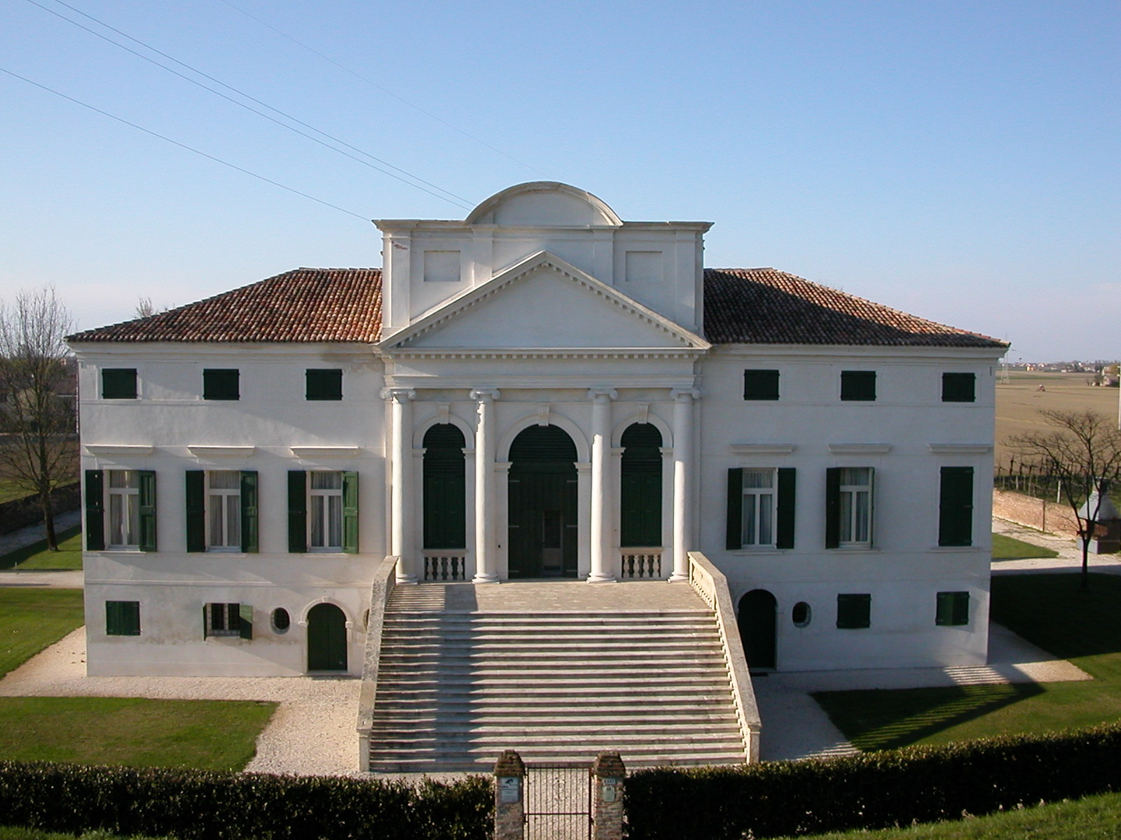 Villa Morosini, Mantovani, Secolo XVI, attribuita a Vincenzo Scamozzi.